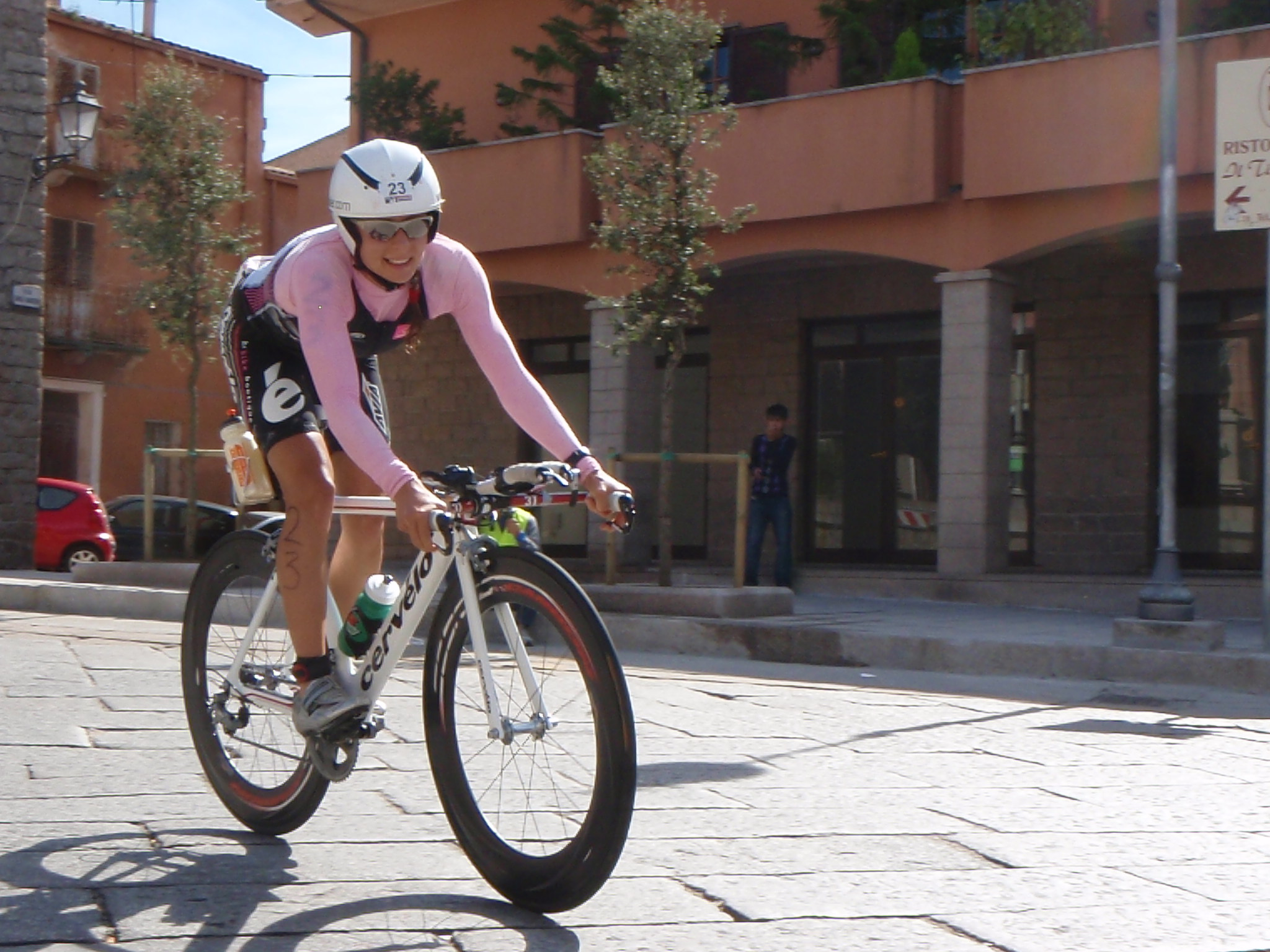 Diana Riesler, TriStar 222 Sardinia 2010